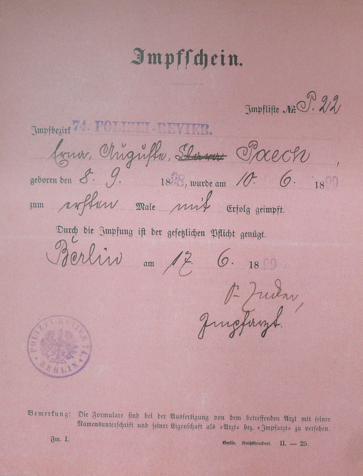 Sammlung Kindheit und Jugend (Stiftung Stadtmuseum Berlin) Impfschein, Berlin 1899